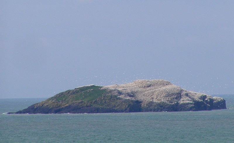 Wyspa Grassholm z kolonią głuptaków (Morus bassanus), Walia